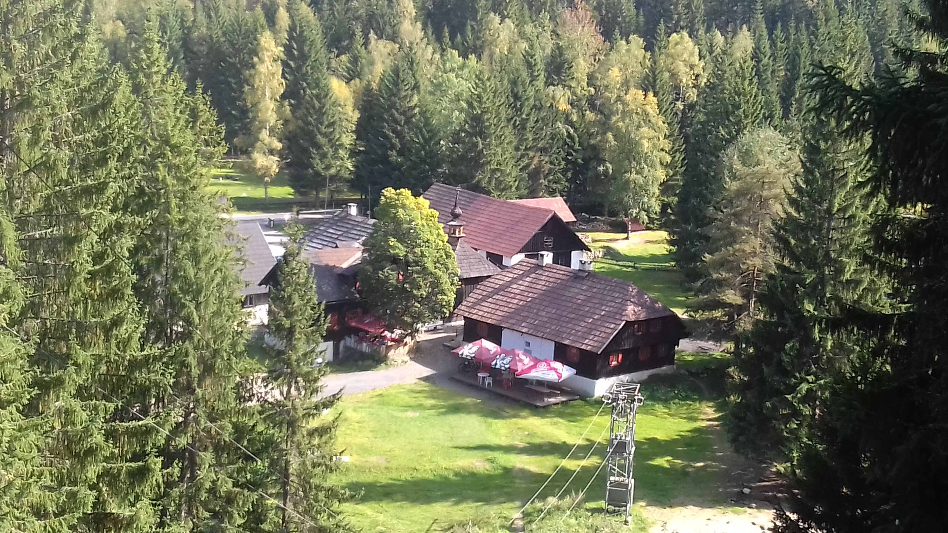 Antýgl - pohled shora od cesty podél Vchynicko-Tetovského kanálu. Součást vesnice "Vchynice-Tetov I", část obce Srní